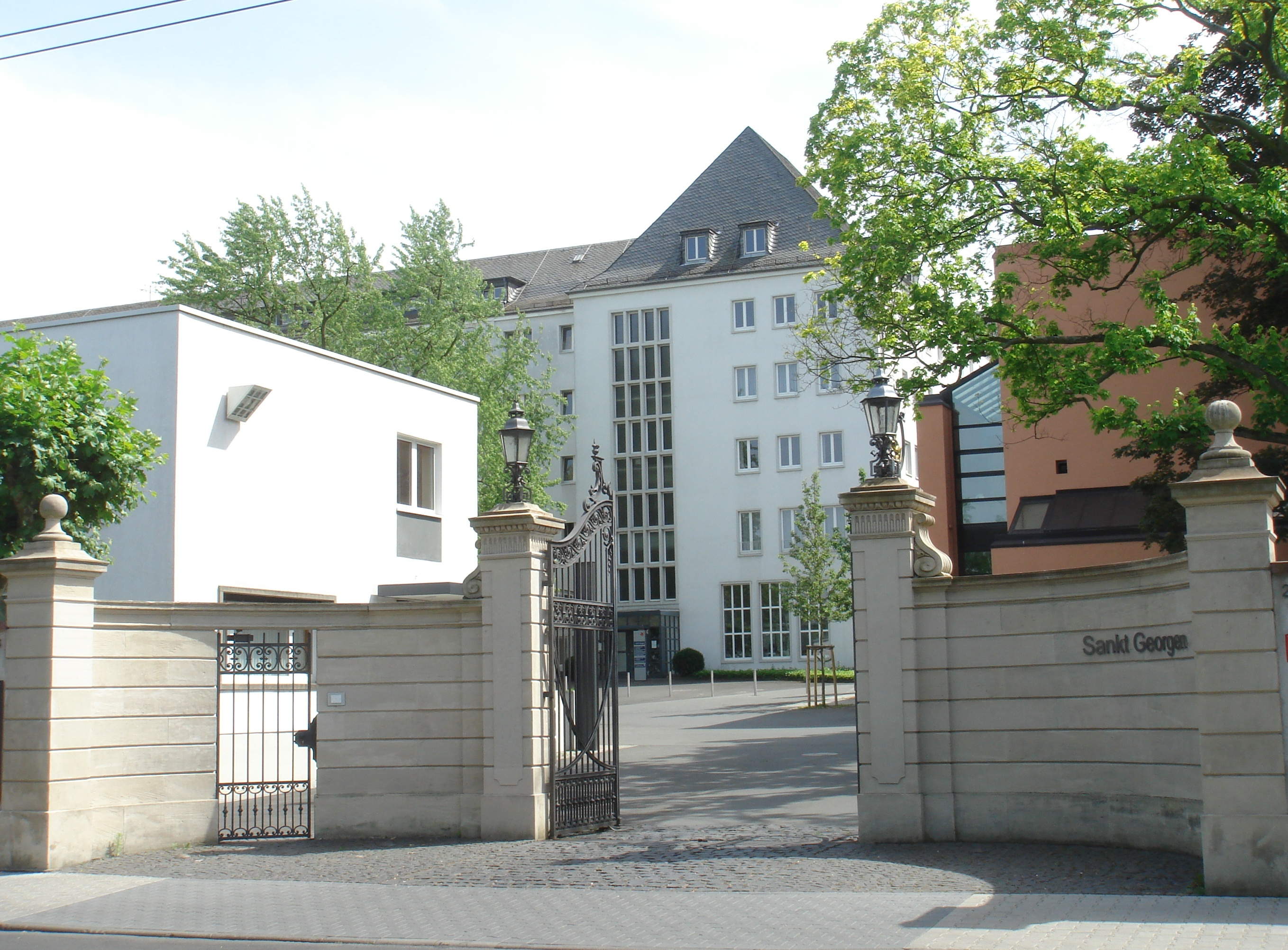 Einfahrt Philosophisch-Theologische Hochschule Sankt Georgen